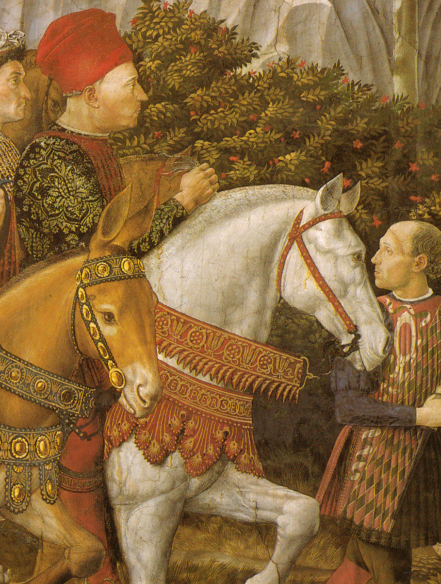 Portrait of Giovanni di Piero il Gottoso (the gouty) de' Medici. Detail from the fresco by Benozzo Gozzoli, in the "Cappella dei Magi", at Palazzo Medici Riccardi in Florence, Italy.